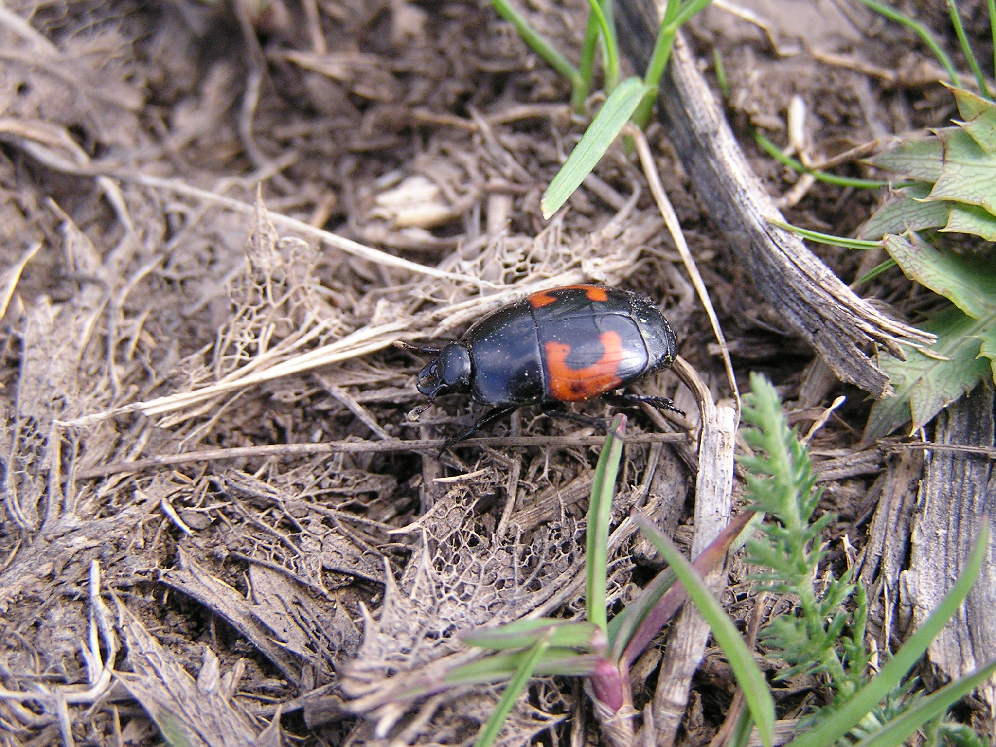 Жук-карапузик, род и вид -- под вопросом (Coleoptera: Histeridae. Снято в Донецке в апреле. Hister illigeri